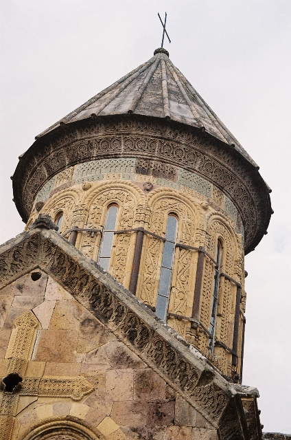 ფიტარეთი